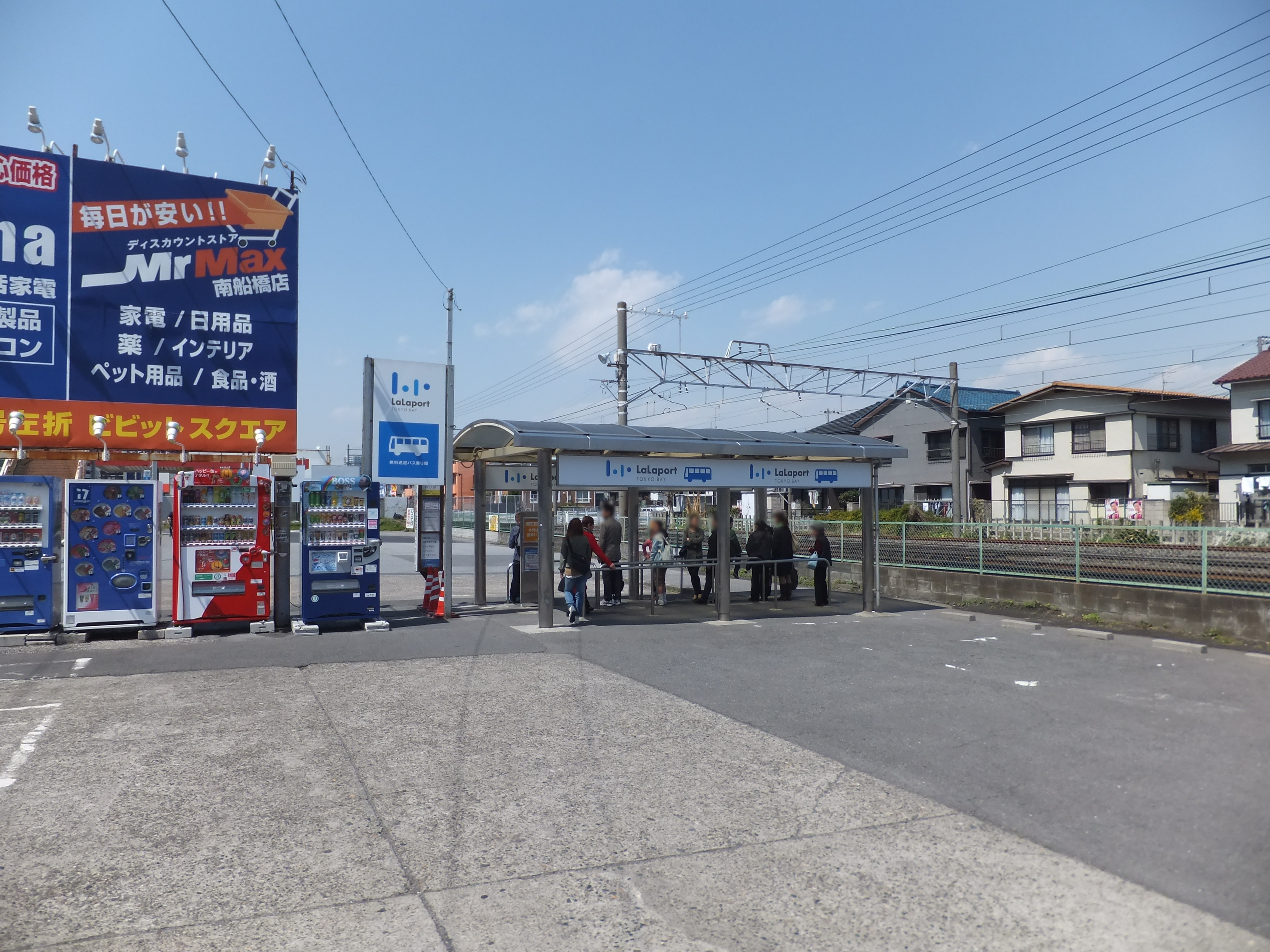 京成線船橋競馬場駅前、ららぽーと行きの無料バス乗り場